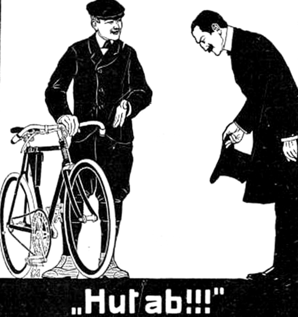 Darstellung eines "Hut ab" oder "Chapeau" Ausrufes für eine Anerkennung. Bearbeiteter Ausschnitt eines Plakates von 1910 mit unbekanntem Besitzer oder Ersteller. Ursprungsbild